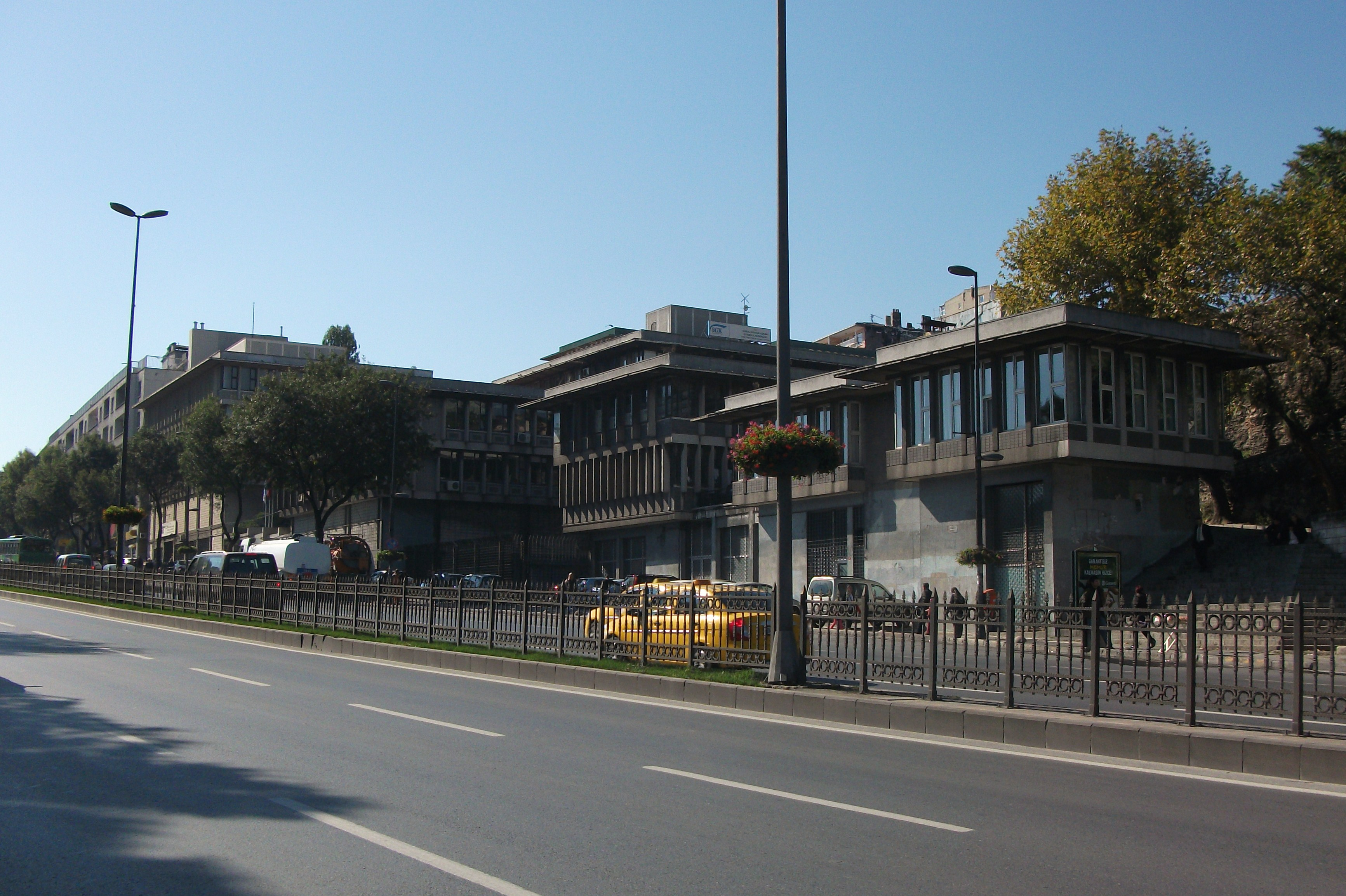 "Türk mimar Sedad Hakkı Eldem tarafından tasarlanan ve 1962-64 yılları arasında İstanbul'un Zeyrek semtinde inşa edilen Sosyal Sigortalar Kurumu Kompleksi. Çağdaş Türk mimarisinin en önemli yapıtlarından biri olan bu bina, mimarına 1986 yılı Ağa Han Mimarlık Ödülü'nü kazandırmıştır."